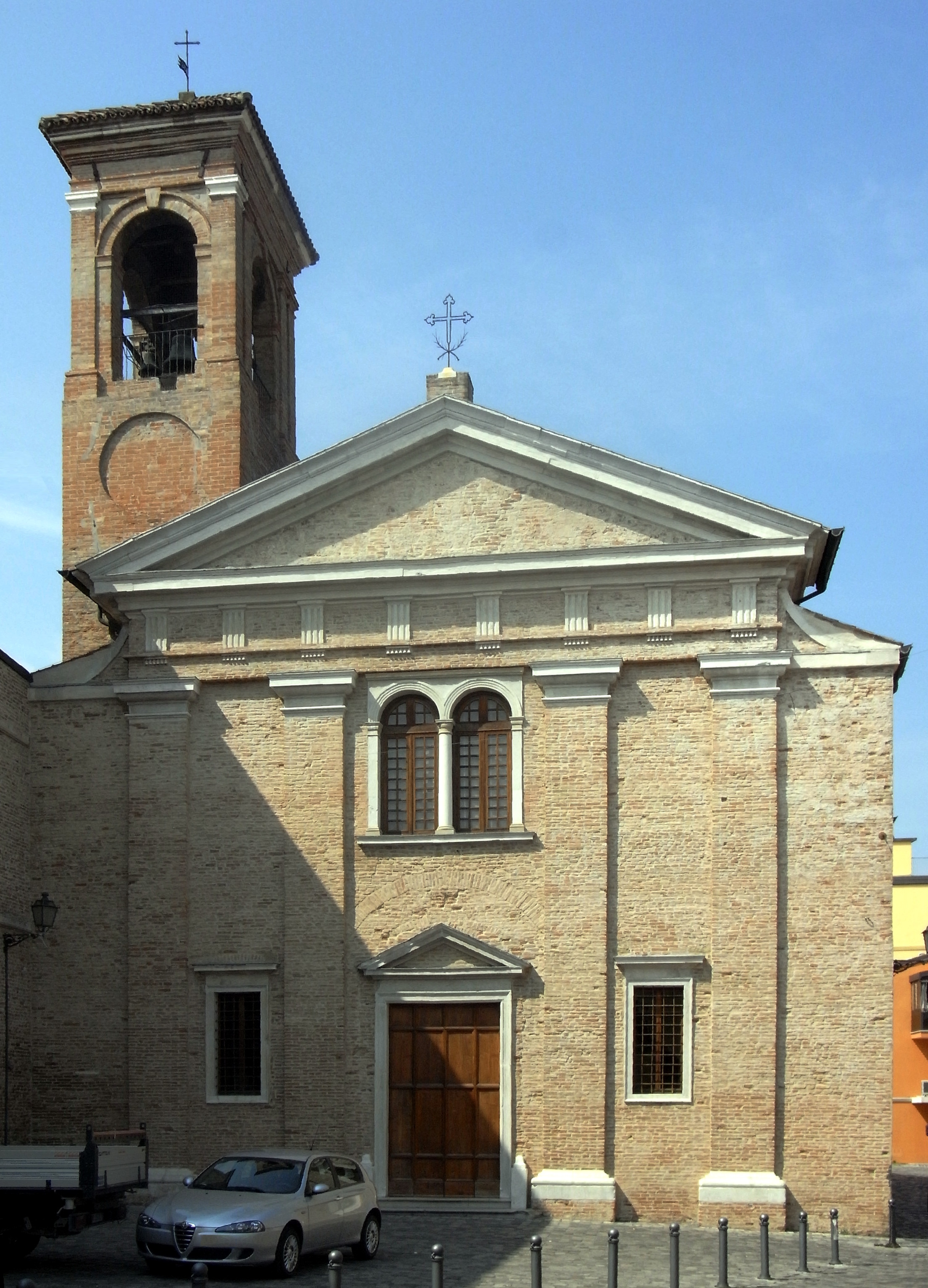 Rimini, Kirche San Giuliano im gleichnamigen Vorort